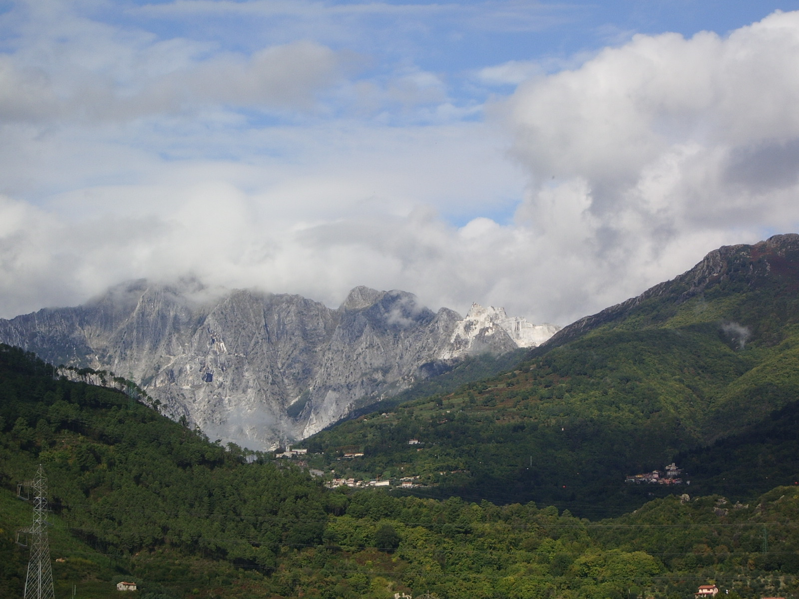 Monte altissimo (Alpi Apuane) da Seravezza